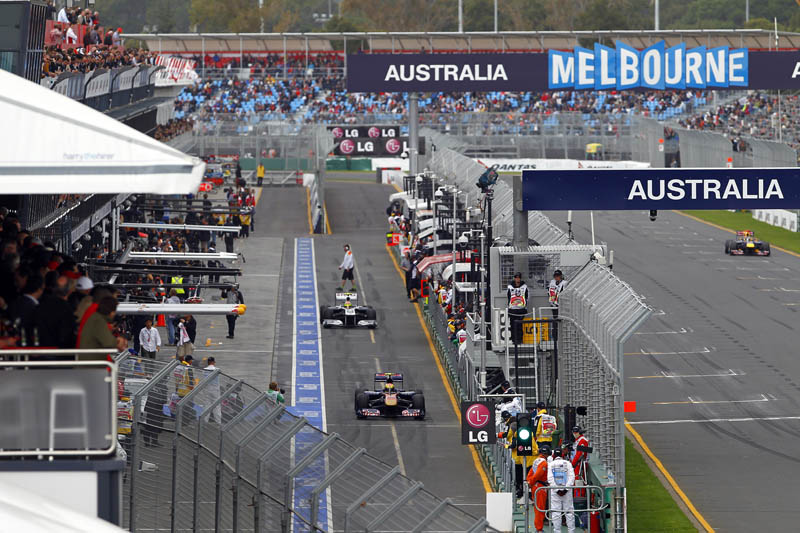 pit lane